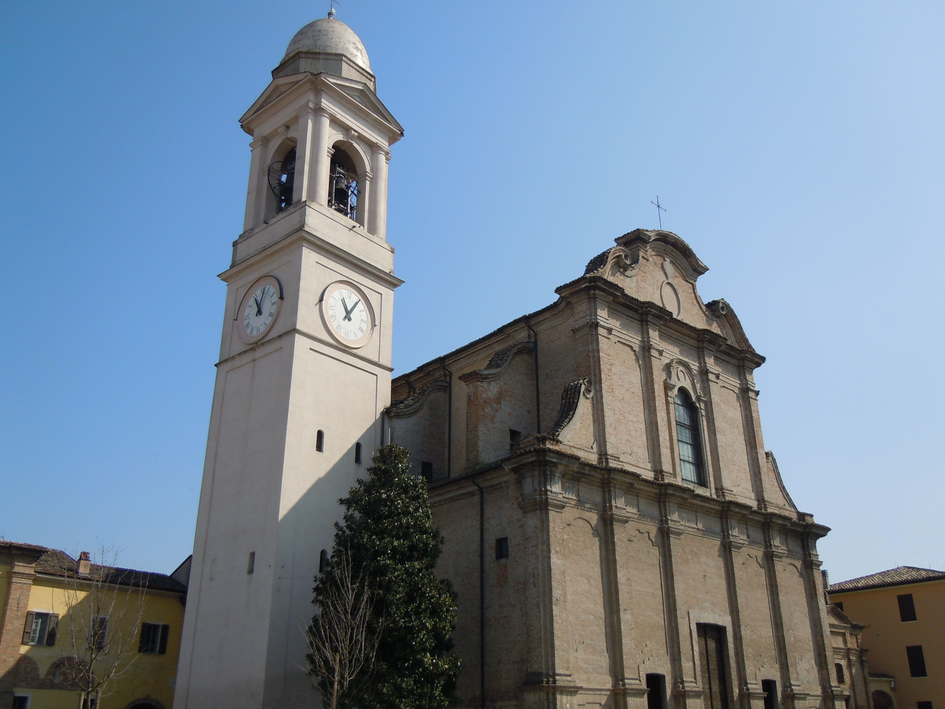 Piadena, chiesa parrocchiale di Santa Maria Assunta.